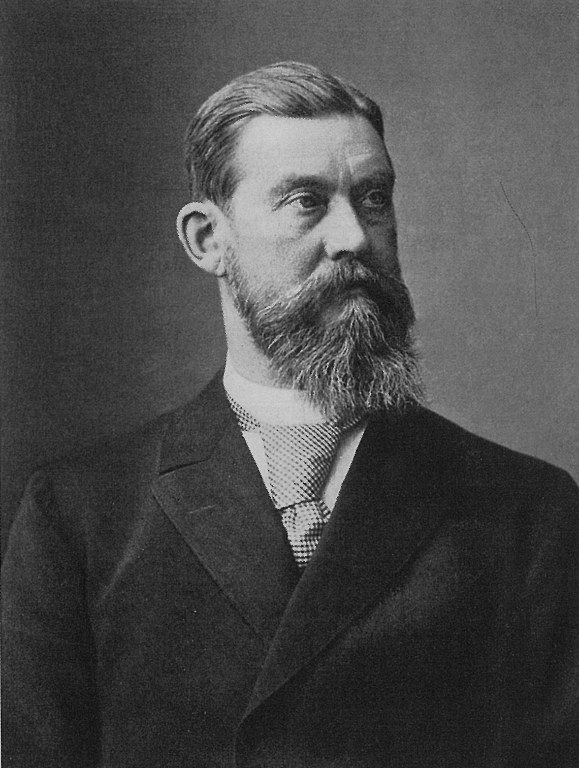 Porträt Bernhard Danckelmann. Abgedruckt im Nachruf in der Zeitschrift für Forst- und Jagdwesen (ZFJW) Nr. 3/1901 (vermutlich letztes Foto).